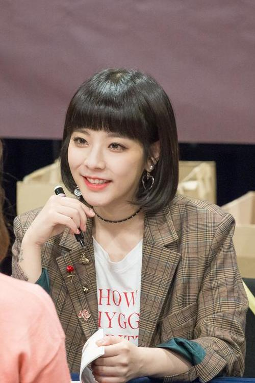 171105 주니엘 팬싸인회